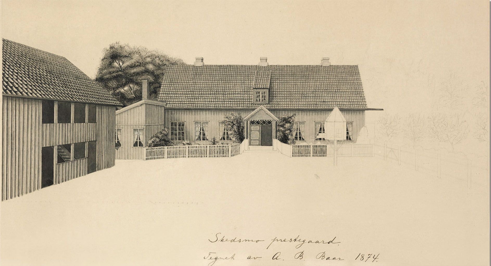 Tegning av Huseby Gård, hovedbygningen, fra 1874.